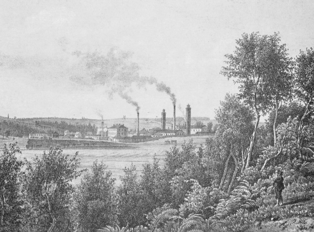 První rakouská továrna na sodu (1855)